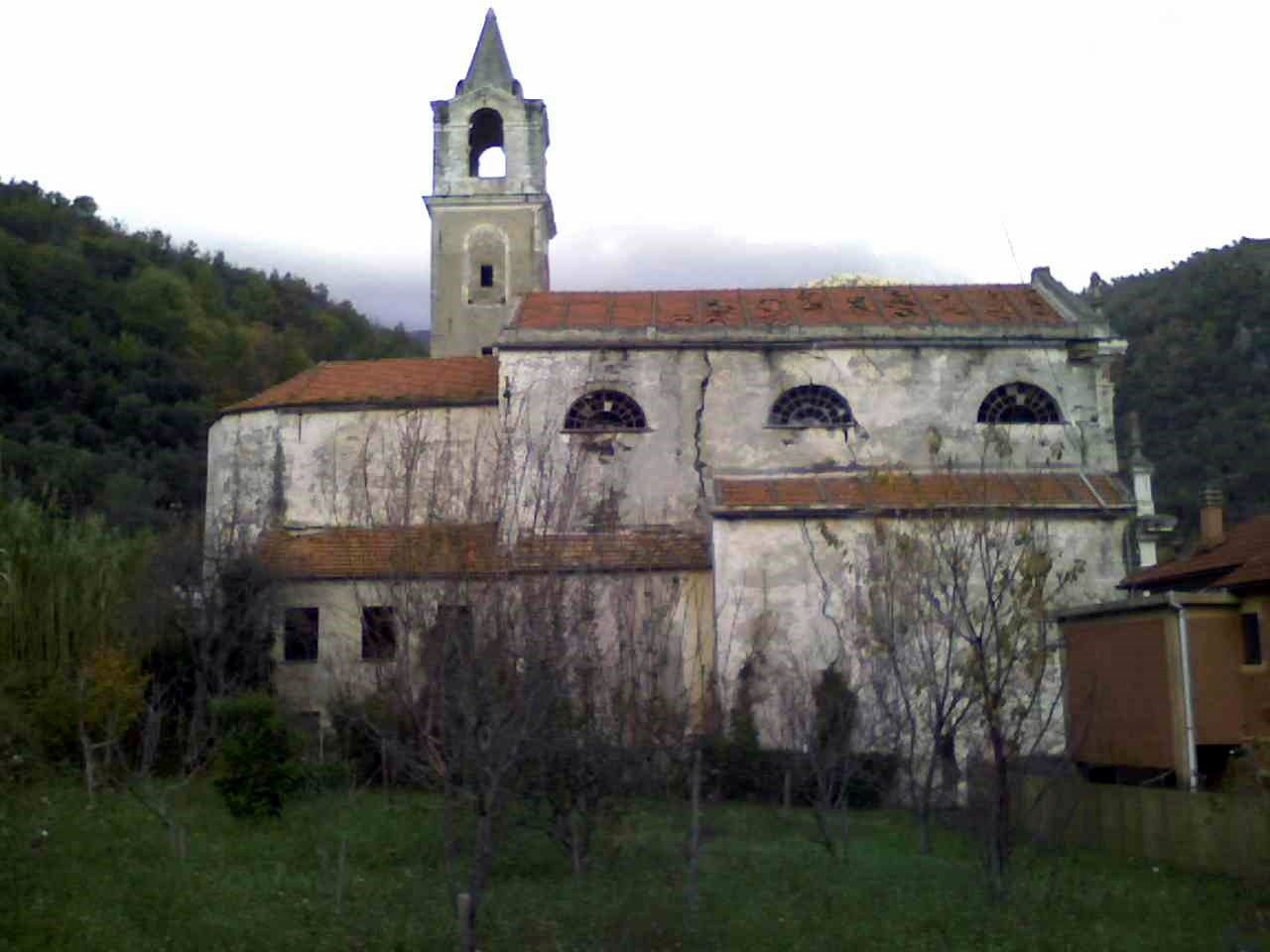 Vecchia chiesa parrocchiale del Pero in Varazze (Italy)